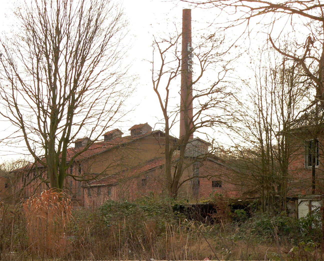 Keramische Hütte in Sehnde